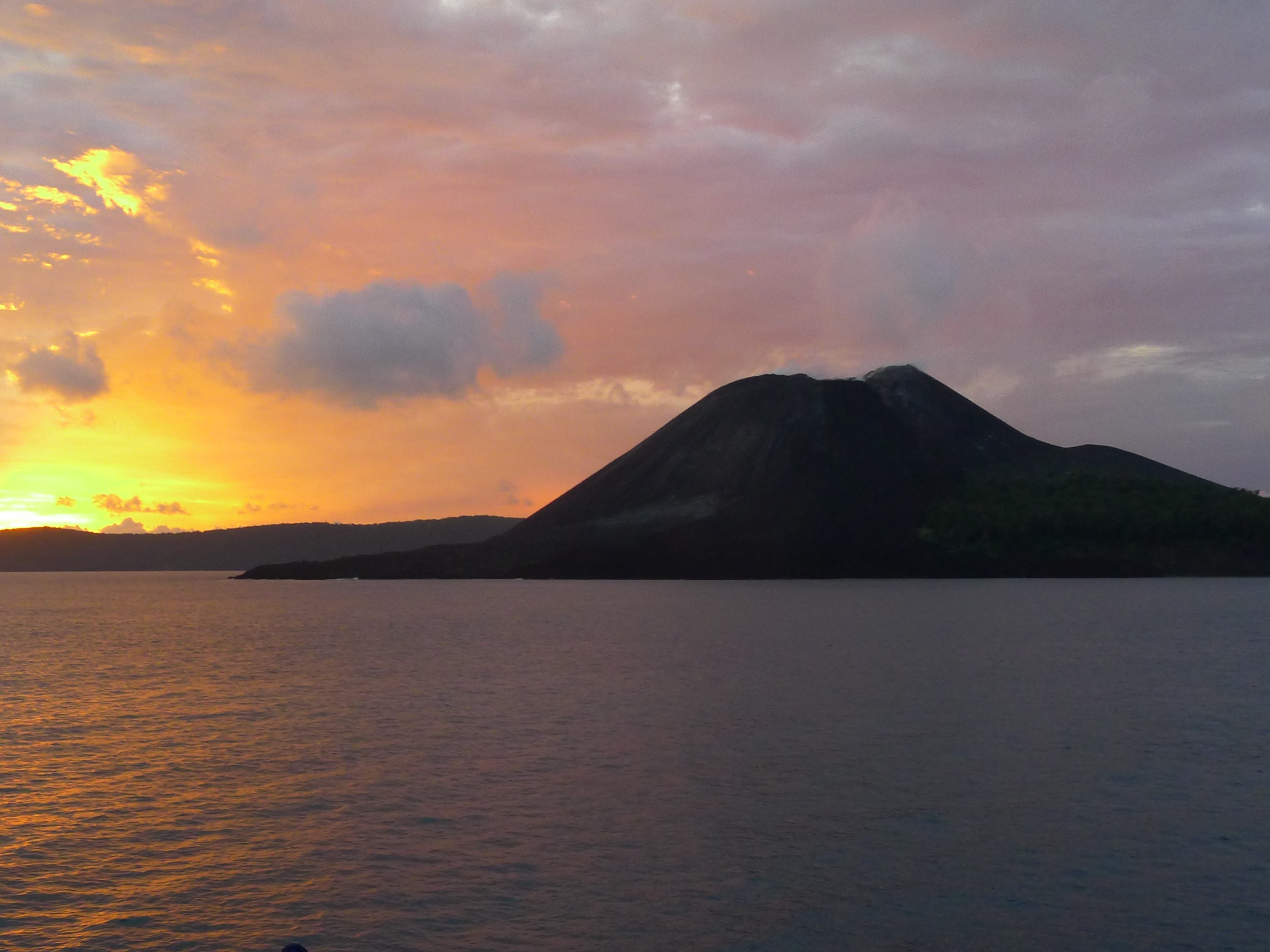 Panorama Gunung Anak Krakatau yang berada di Selat Sunda menjelang senja.